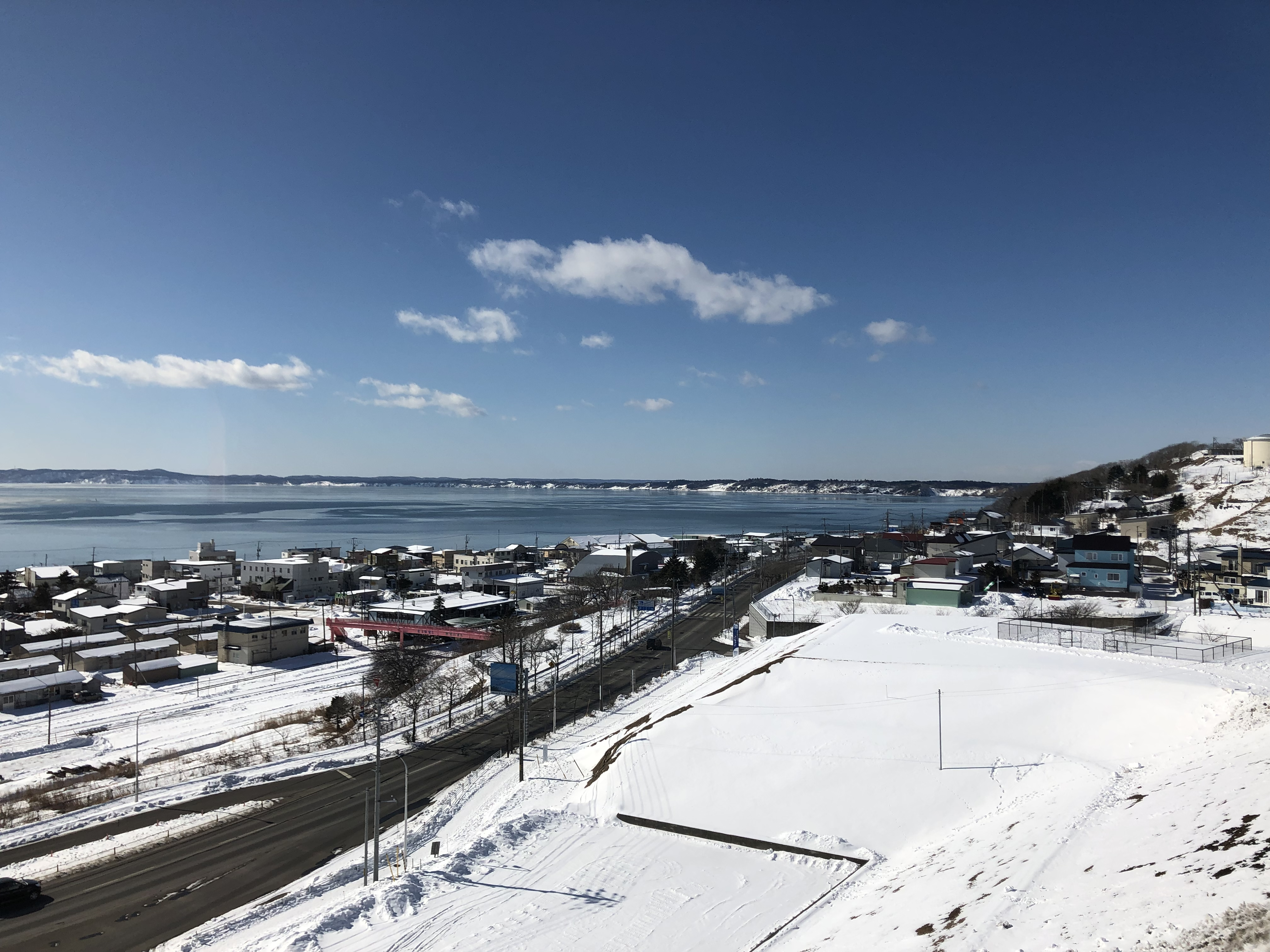 「厚岸味覚ターミナル コンキリエ」から厚岸駅方面を撮影した画像。2019年2月14日撮影。